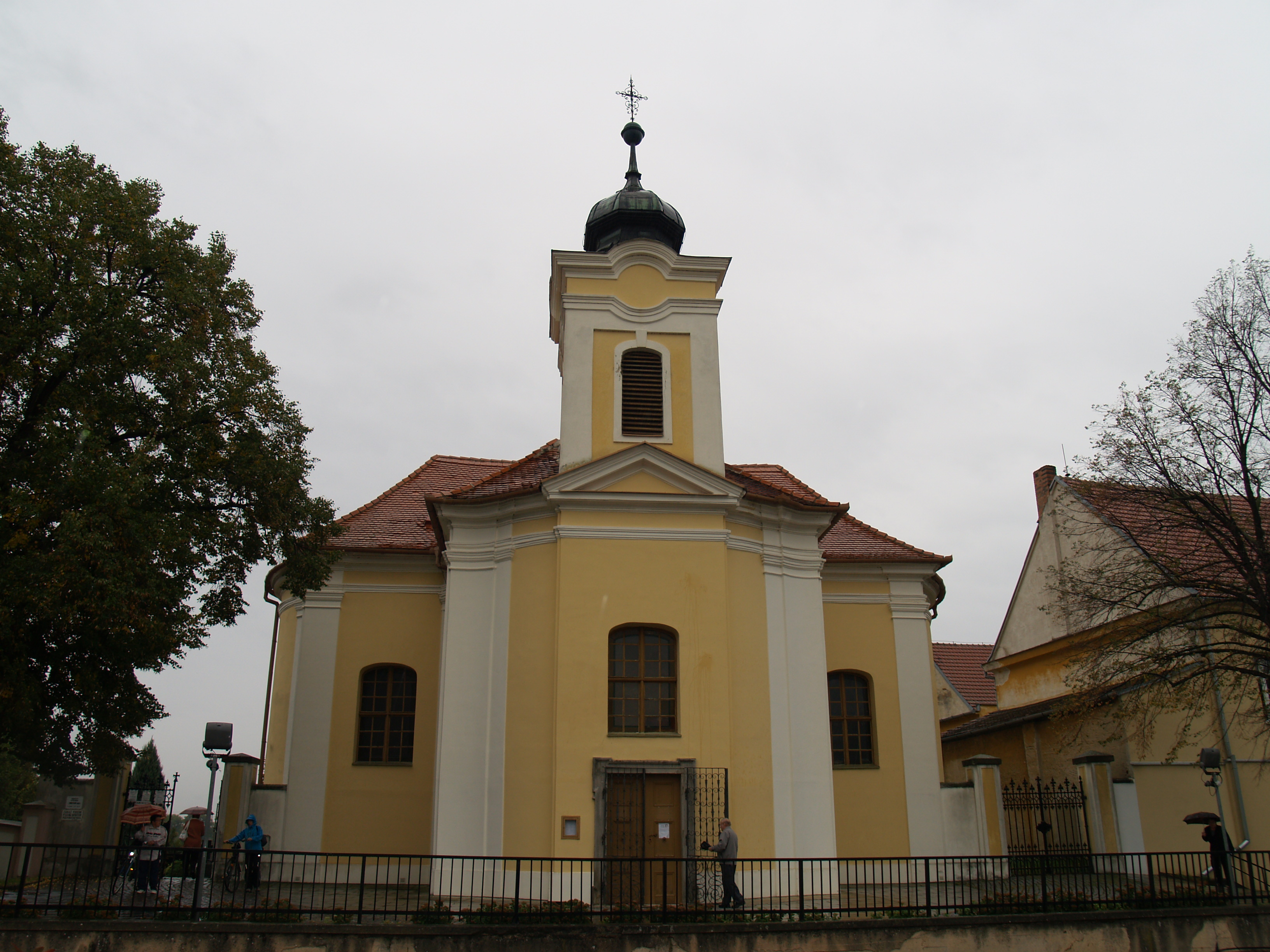 Pohled na presbytář kostela Povýšení sv. Kříže v Rajhradě